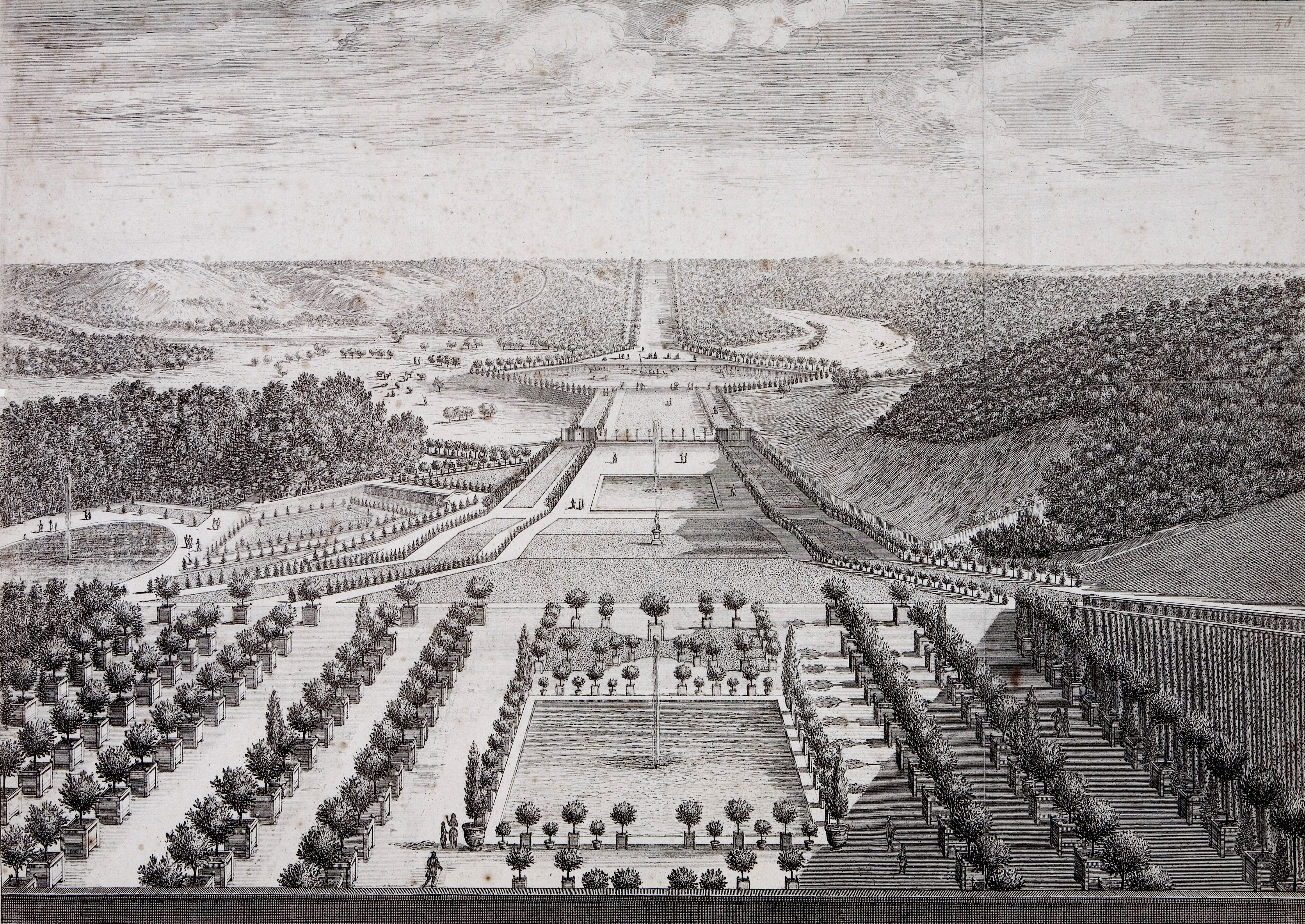 Vue du jardin et parc du château de Meudon apartenant à Monseigneur le marquis de Louvois. Gravure par Israel Silvestre. Vue prise de la “Loggia” montrant la Grande Perspective du château vers 1685.